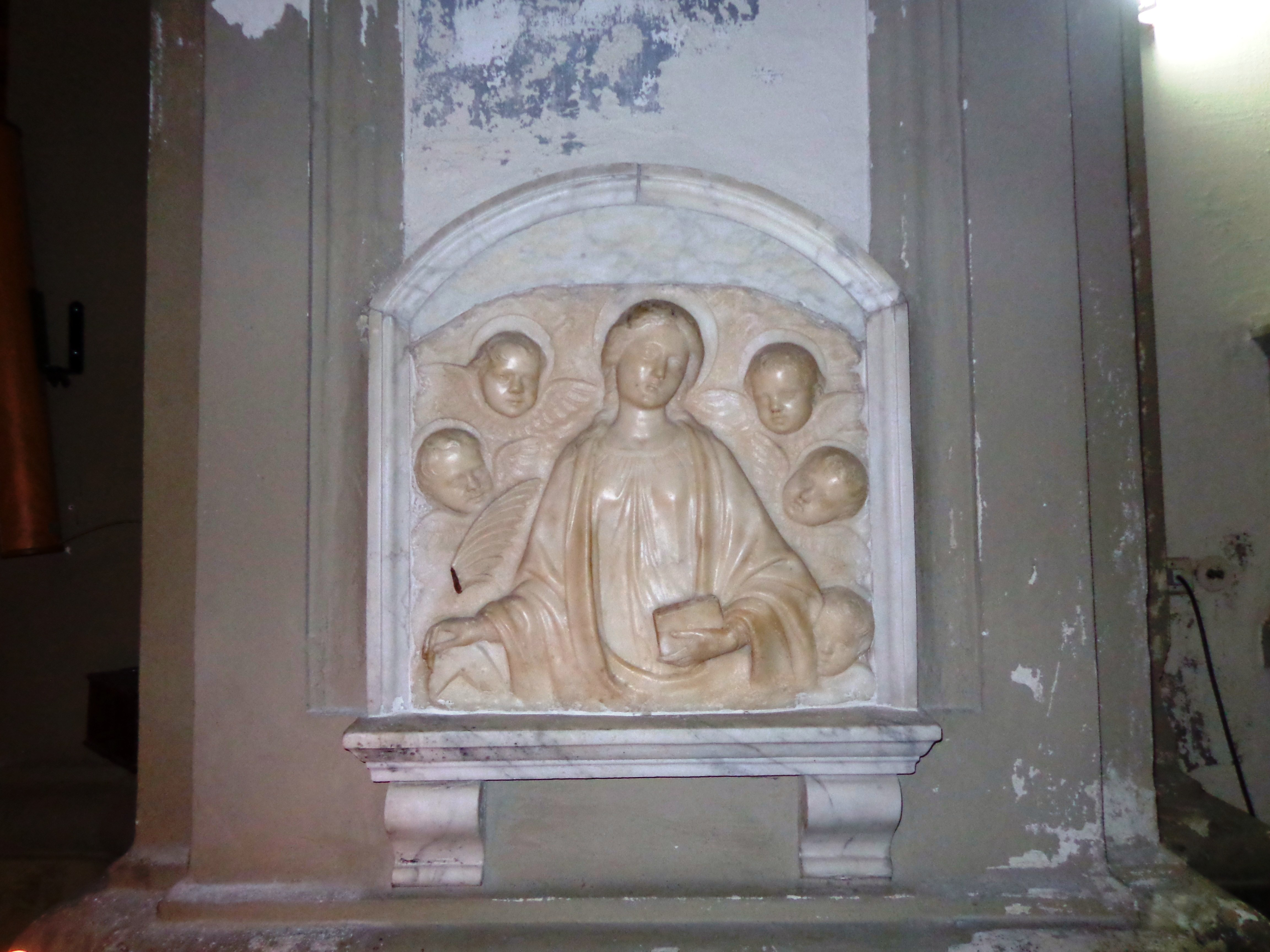 San Domenico PA 01